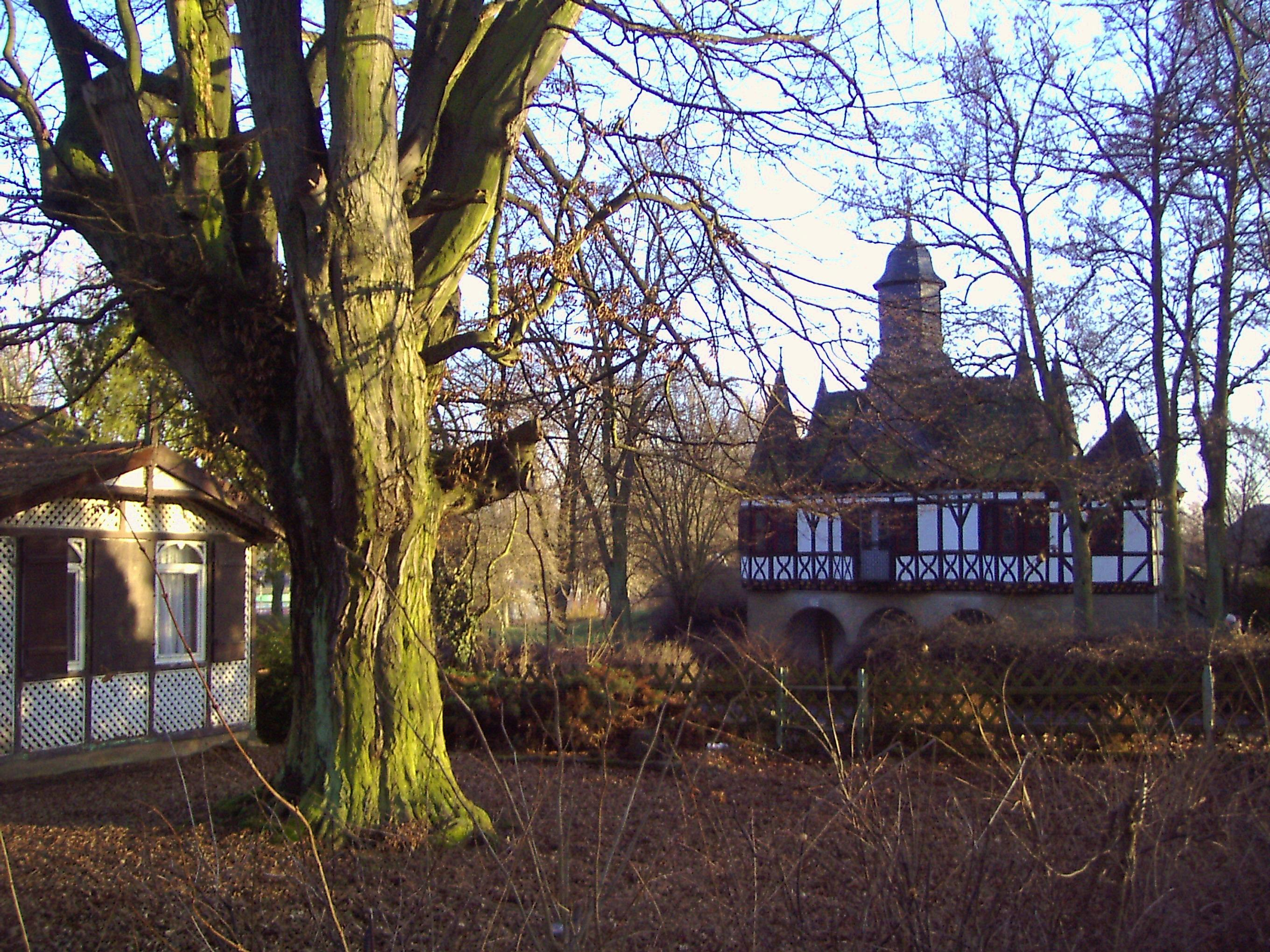 Popperöder Brunnenhaus, im Vordergrund alte Hainbuche.